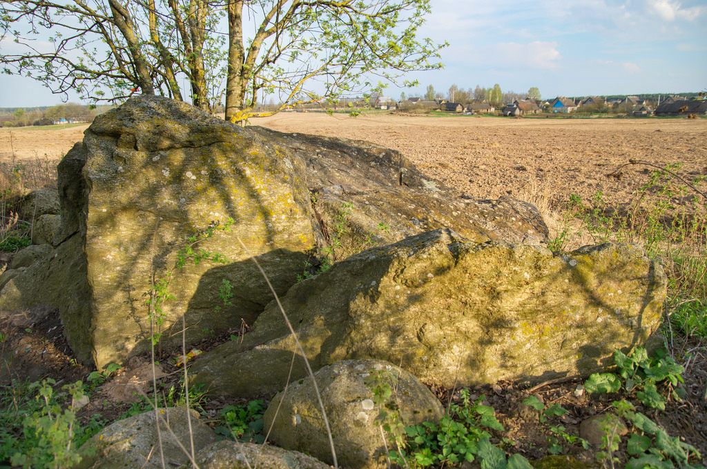 «Гомсін камень» куранецкі